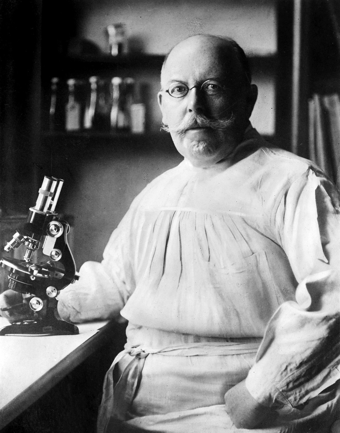 Friedrich Loeffler